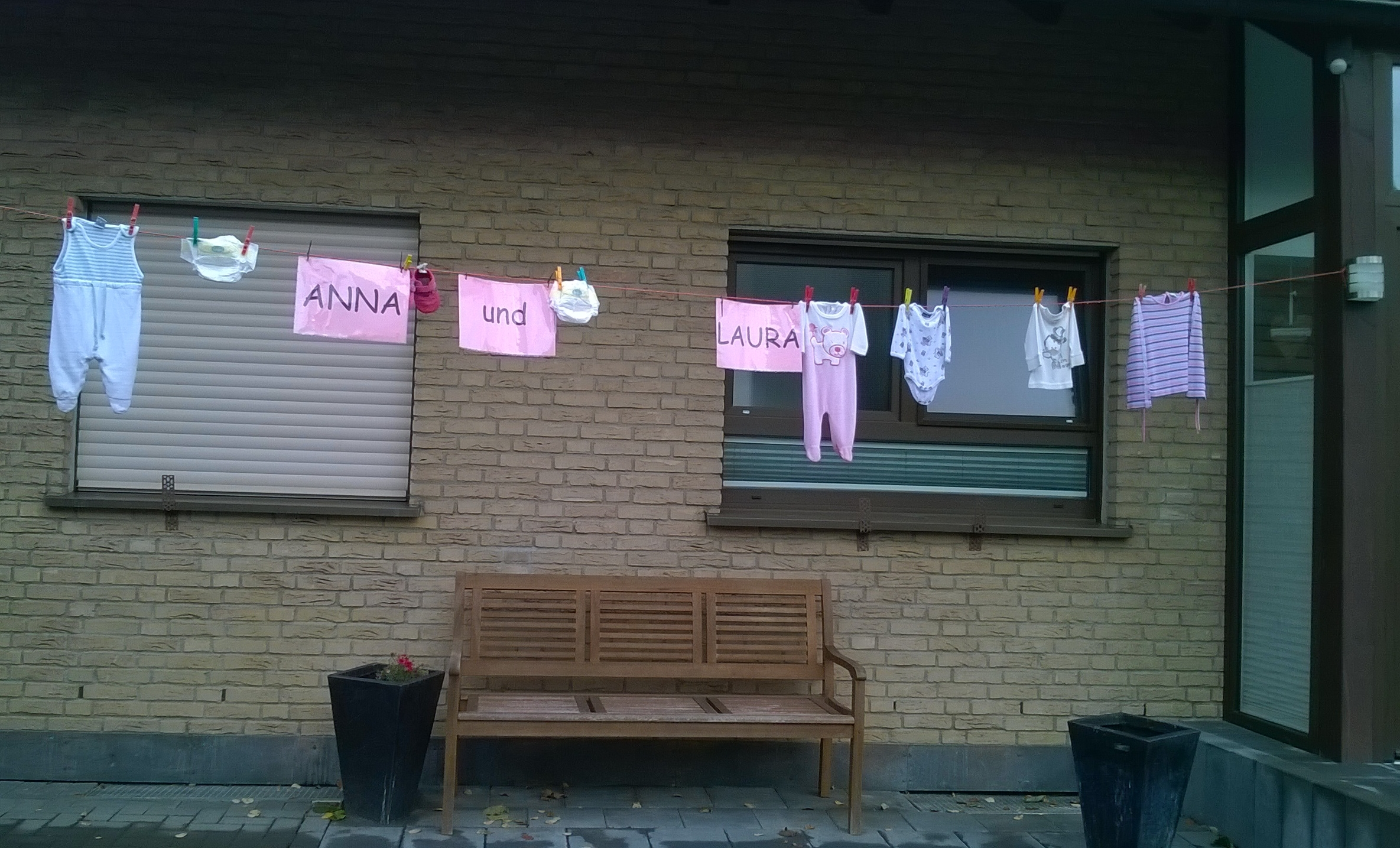 Brauchtum: Geburtsanzeige durch das Aufhängen Babywäsche vor dem Haus, hier die Anzeige der Geburt von Anna und Laura in Landwehr (Overath), NRW